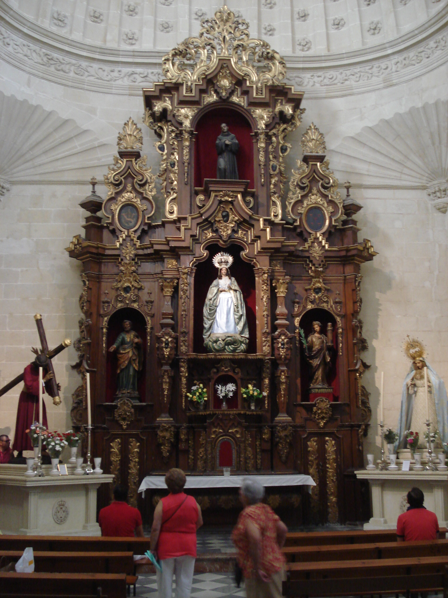 Iglesia de San Francisco en Jerez de la Frontera